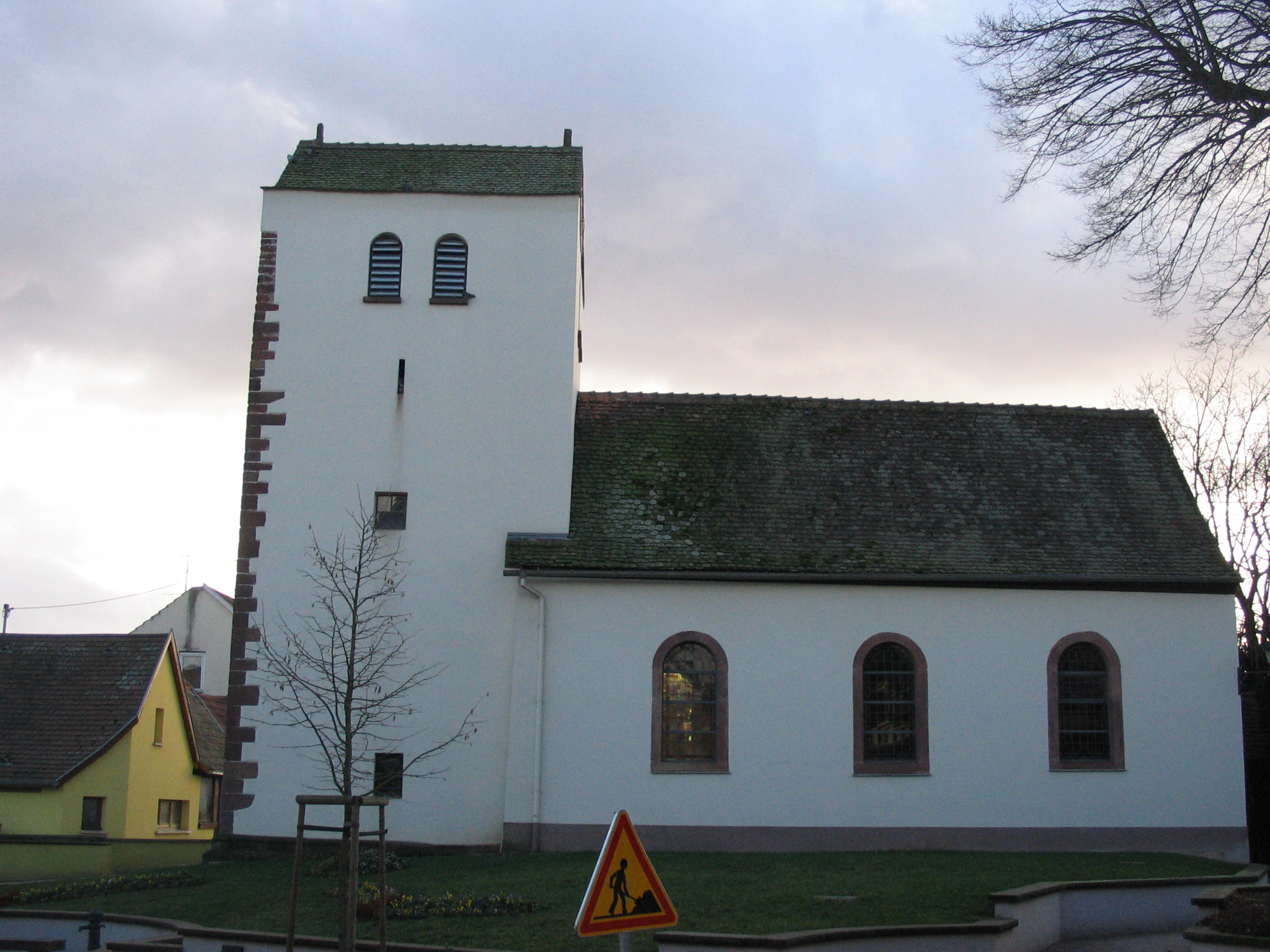 Église Saint-Michel de Pfulgriesheim (Bas-Rhin), du 18è siècle et recensée à l'inventaire général du patrimoine.